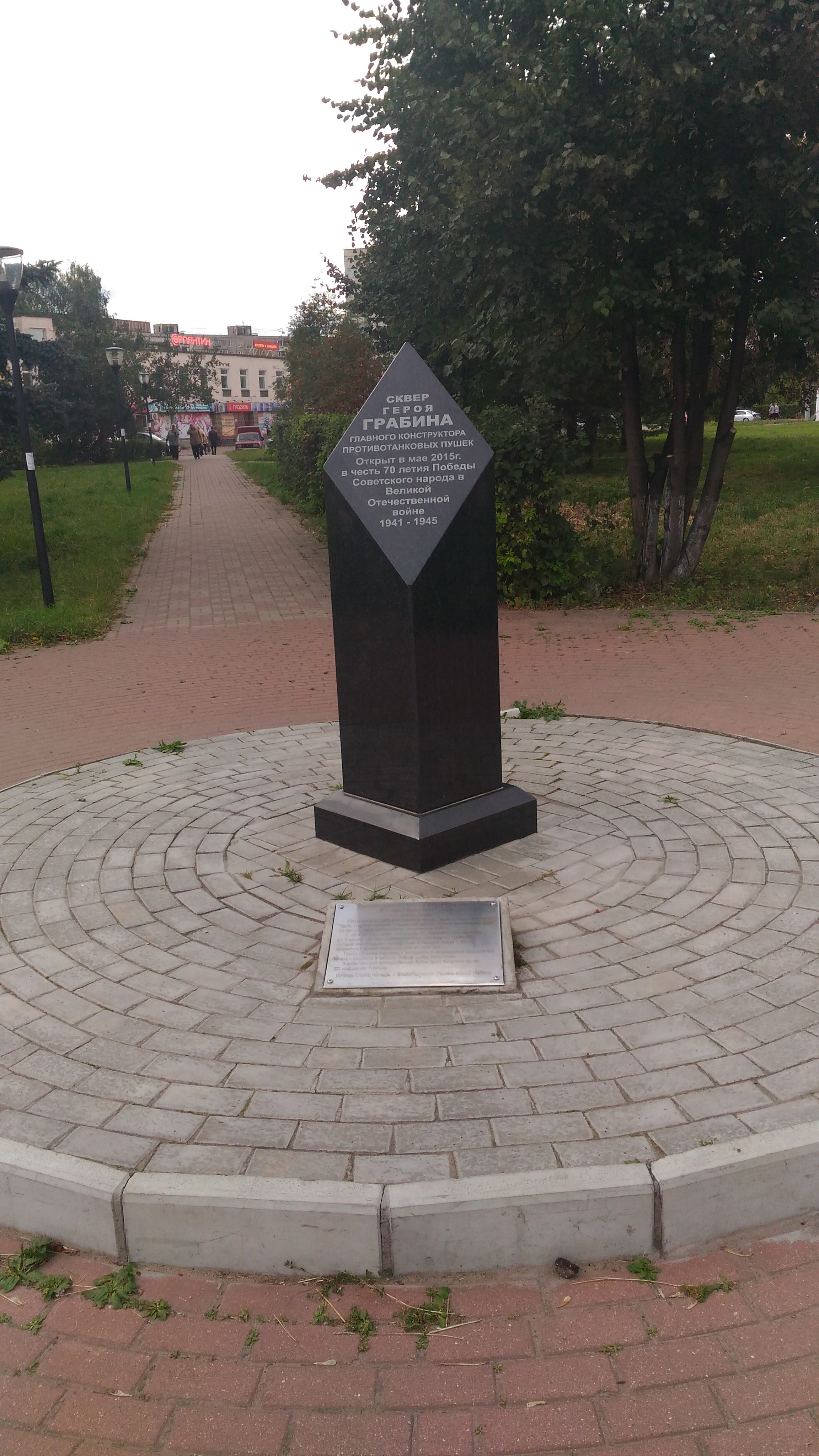 Нижний Новгород. Памятный знак в честь Героя Советского Союза В. Грабина